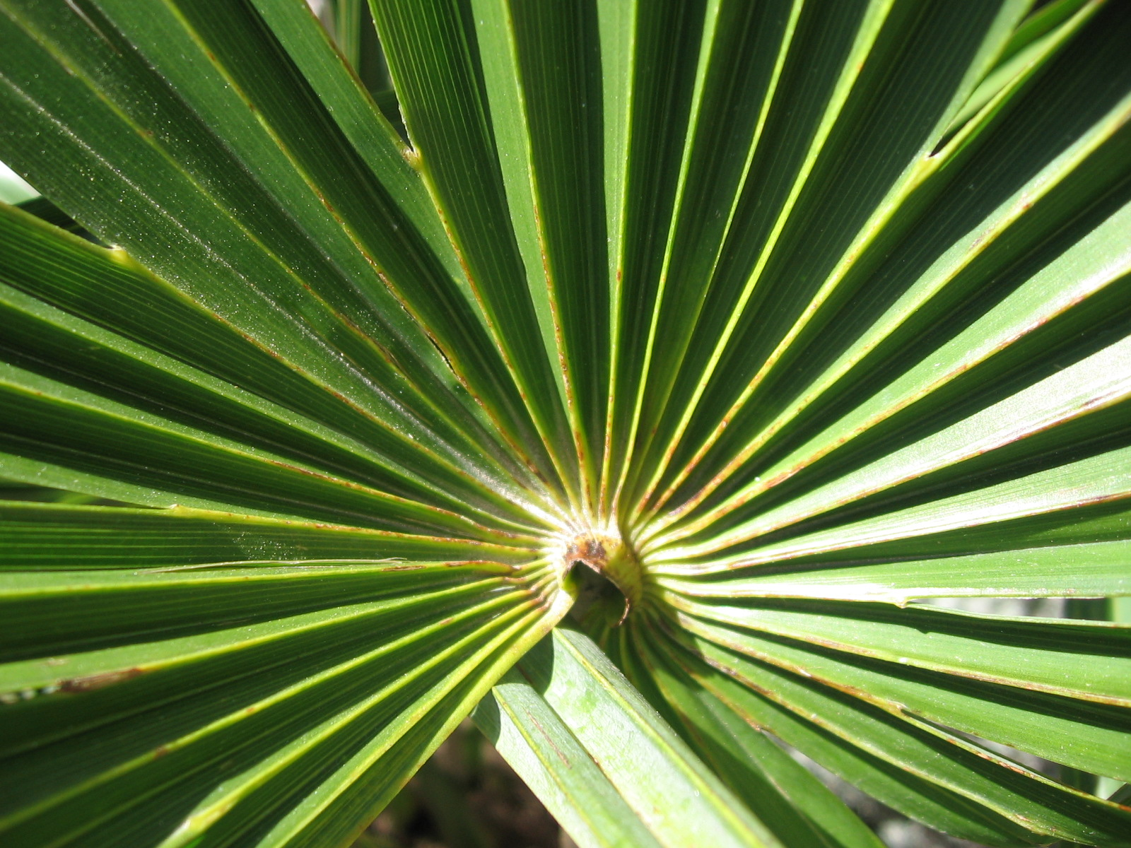 Rhapis excelsa (syn. Chamaerops excelsa)